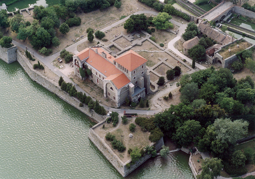 Die Burg von Tata am Öreg-See in Ungarn. Im ausgehenden 19. Jahrhundert wurde die seeseitige Front im neogotischen Stil teilrekonstruiert. Dort befindet sich heute das Kuny Domokos Megyei Múzeum.